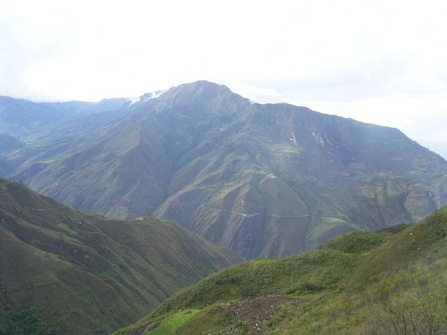 Paisaje alrededor de Maria, Luya, Amazonas, Peru